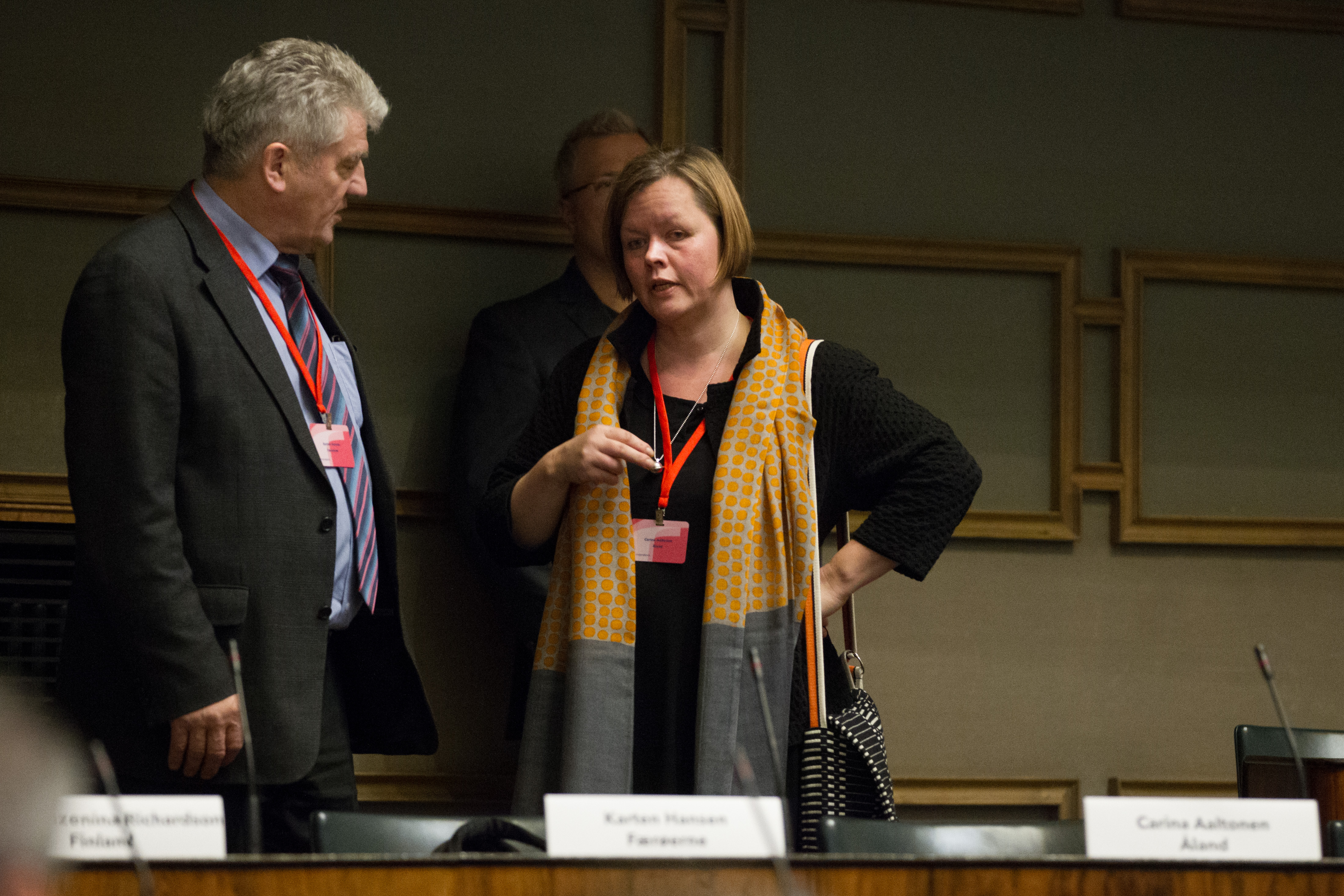 Nordiska rådets session i Helsingfors.